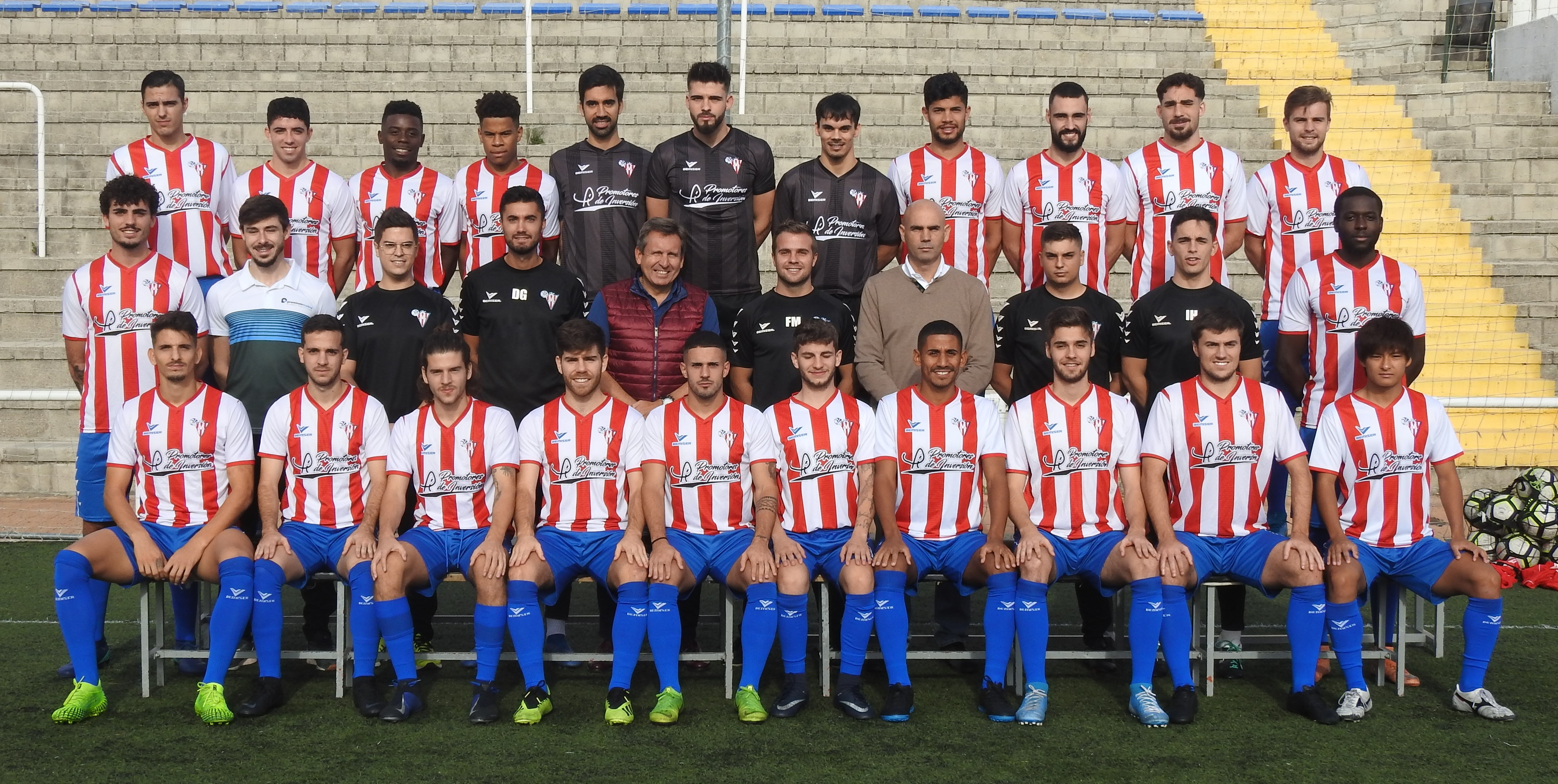 Plantilla Cdc Moscardó 2019/20 con el presidente Javier Artero y el Vicepresidente Juan José Castro